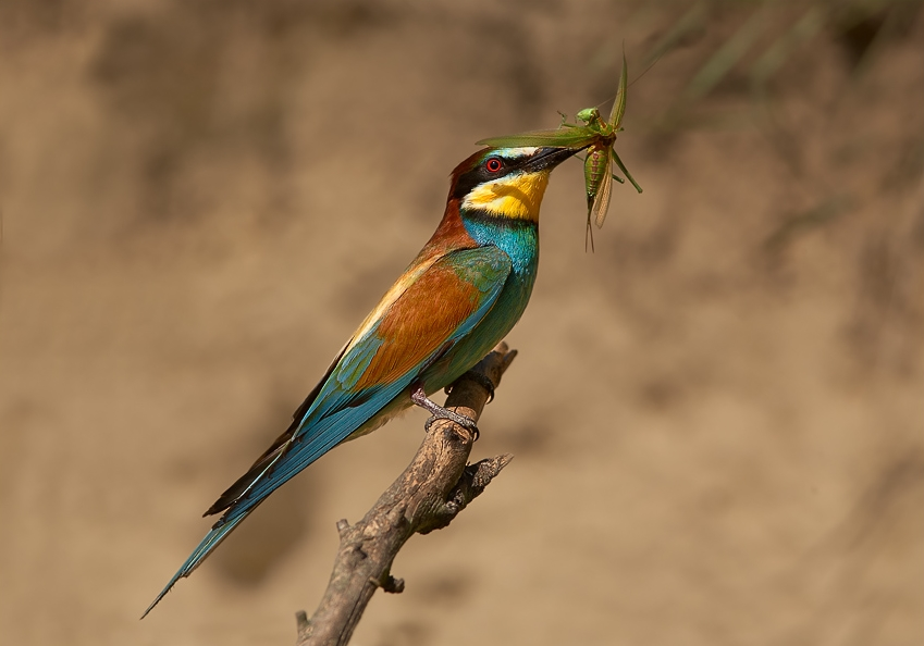 Merops apiaster, jižní Morava, CZ